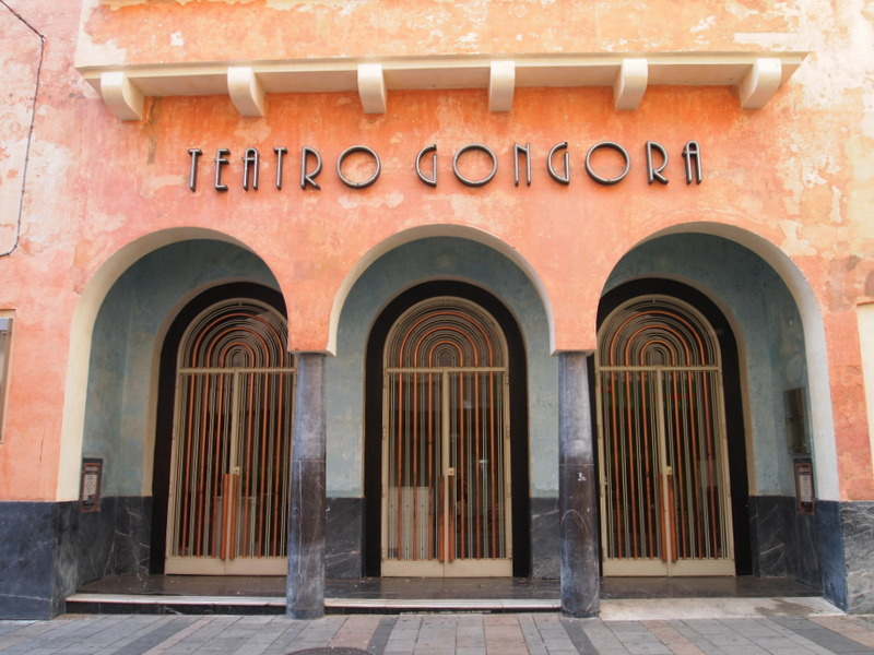 Entrada del Teatro Góngora, Córdoba (España).